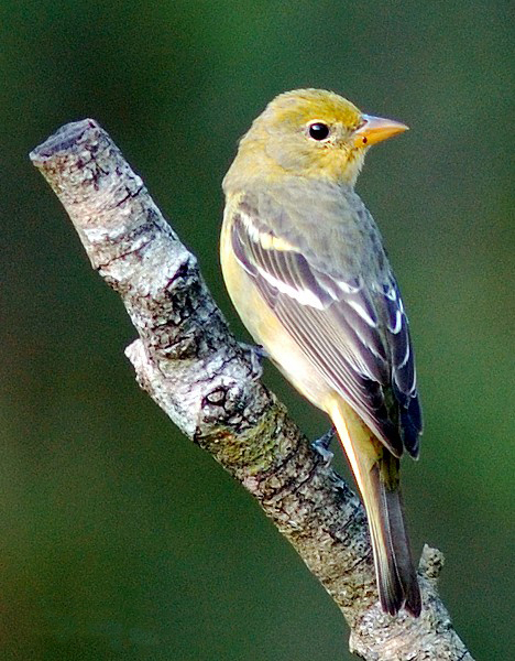 (Female) Adult Western Tanager (Piranga ludoviciana). Golden Gate Estates, Collier Co., Florida